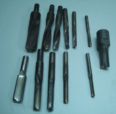 Série de mèches de mortaiseuse